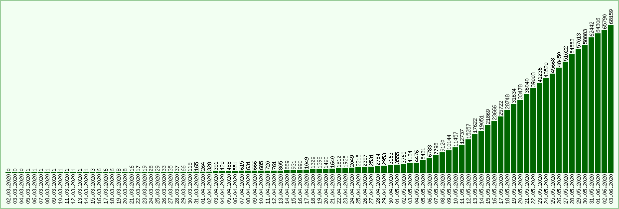 Коронавирус в Саудовской Аравии